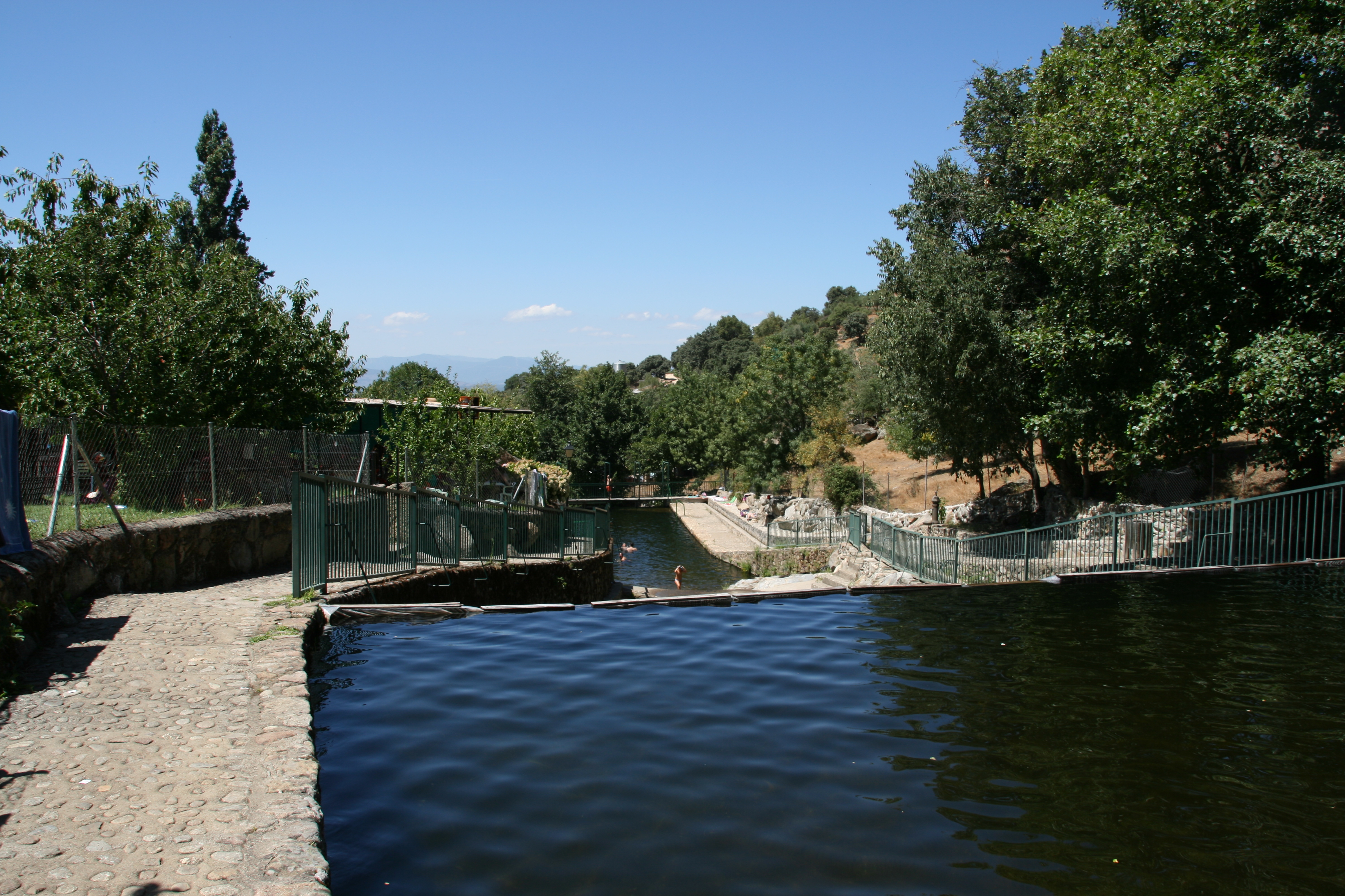 Piscinas naturales en el río Garganta Grande, en Segura de Toro